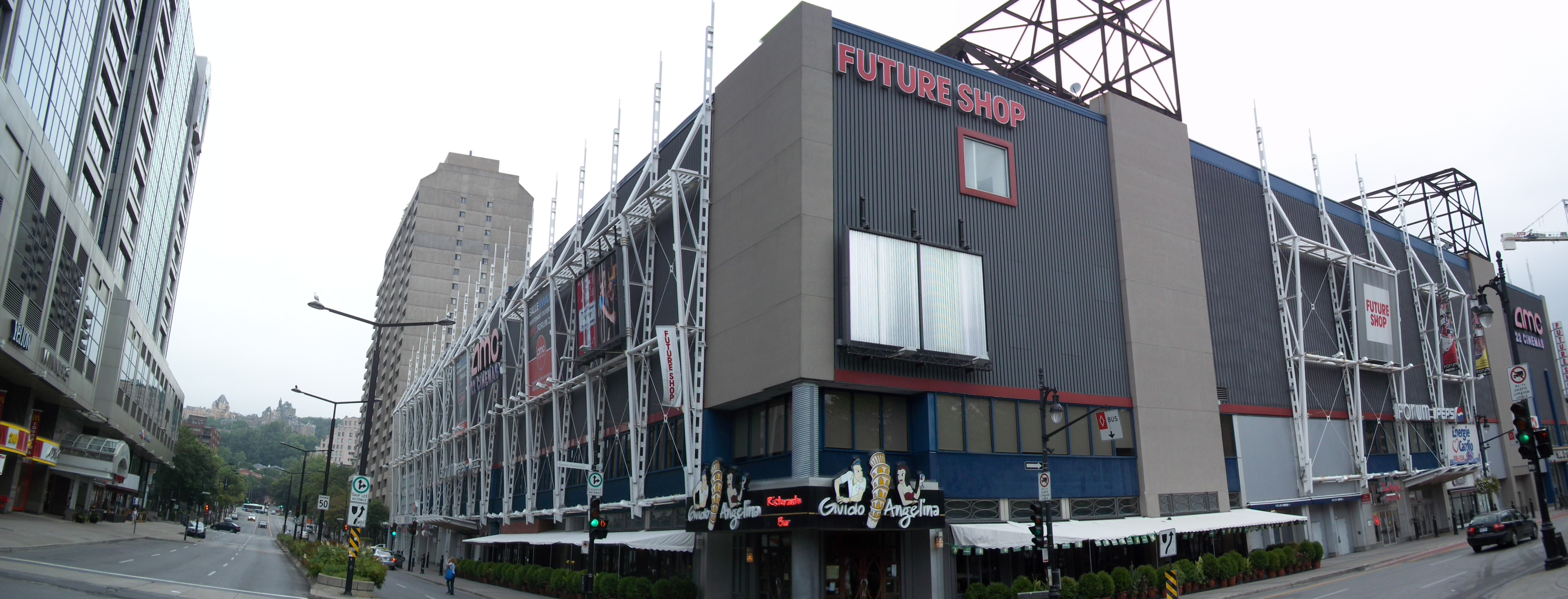 Forum Pepsi, 2310, rue Sainte-Catherine ouest, Montréal Lieu historique national du canada Notre histoire : Arenas